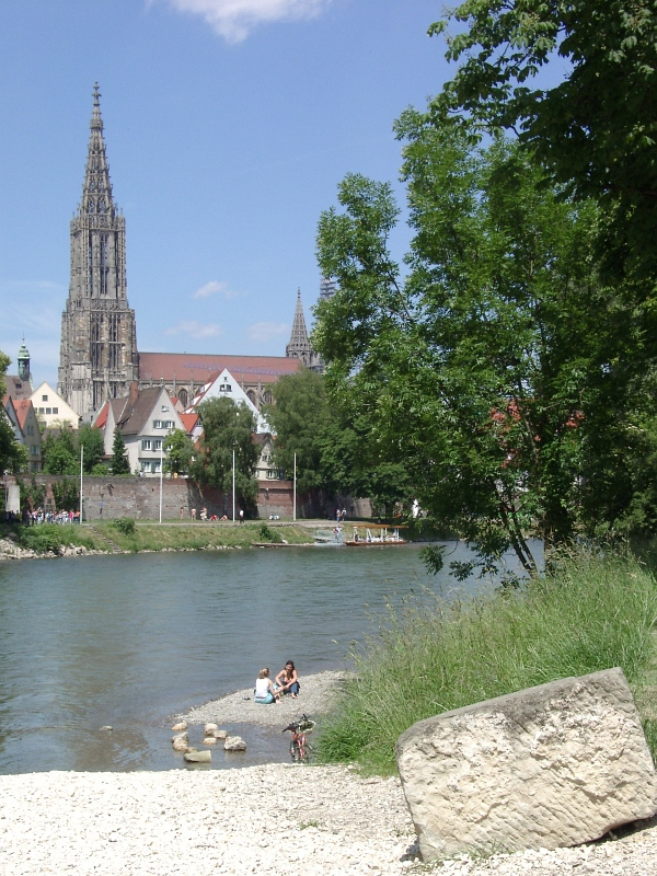 Das Ulmer Münster mit der Donau und einer Kiesbank im Vordergrund Das Ulmer Münster mit der Donau und einer Kiesbank im Vordergrund